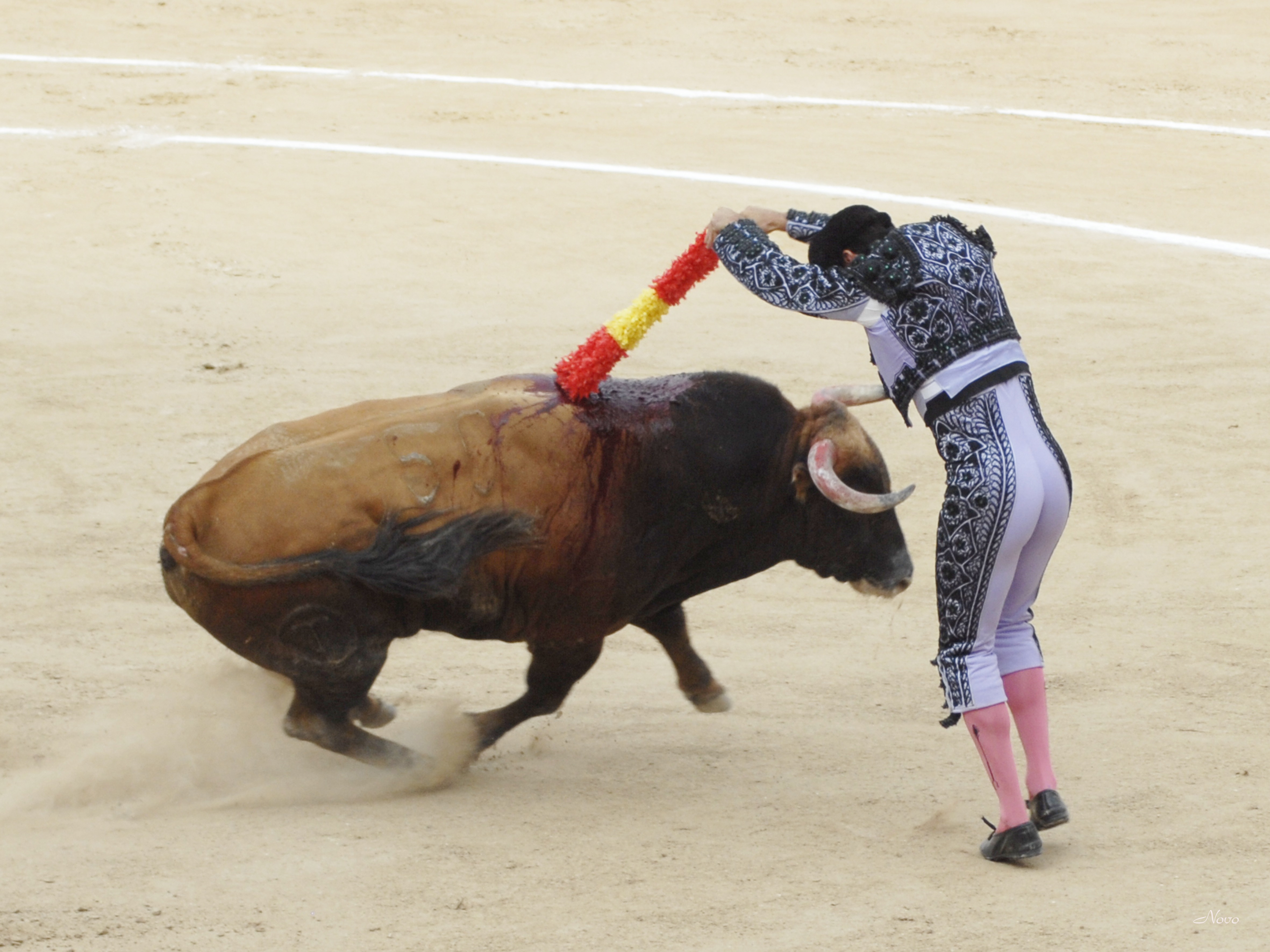 Banderillero